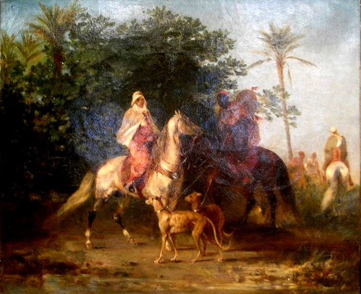 Départ pour la chasse (1857) - Huile sur toile (38 x 46 cm) monogrammé et daté 57. Peint par Eugène Fromentin - Musée des Beaux Arts de La Rochelle. Arabes, coursiers et sloughis (lévriers berbères).